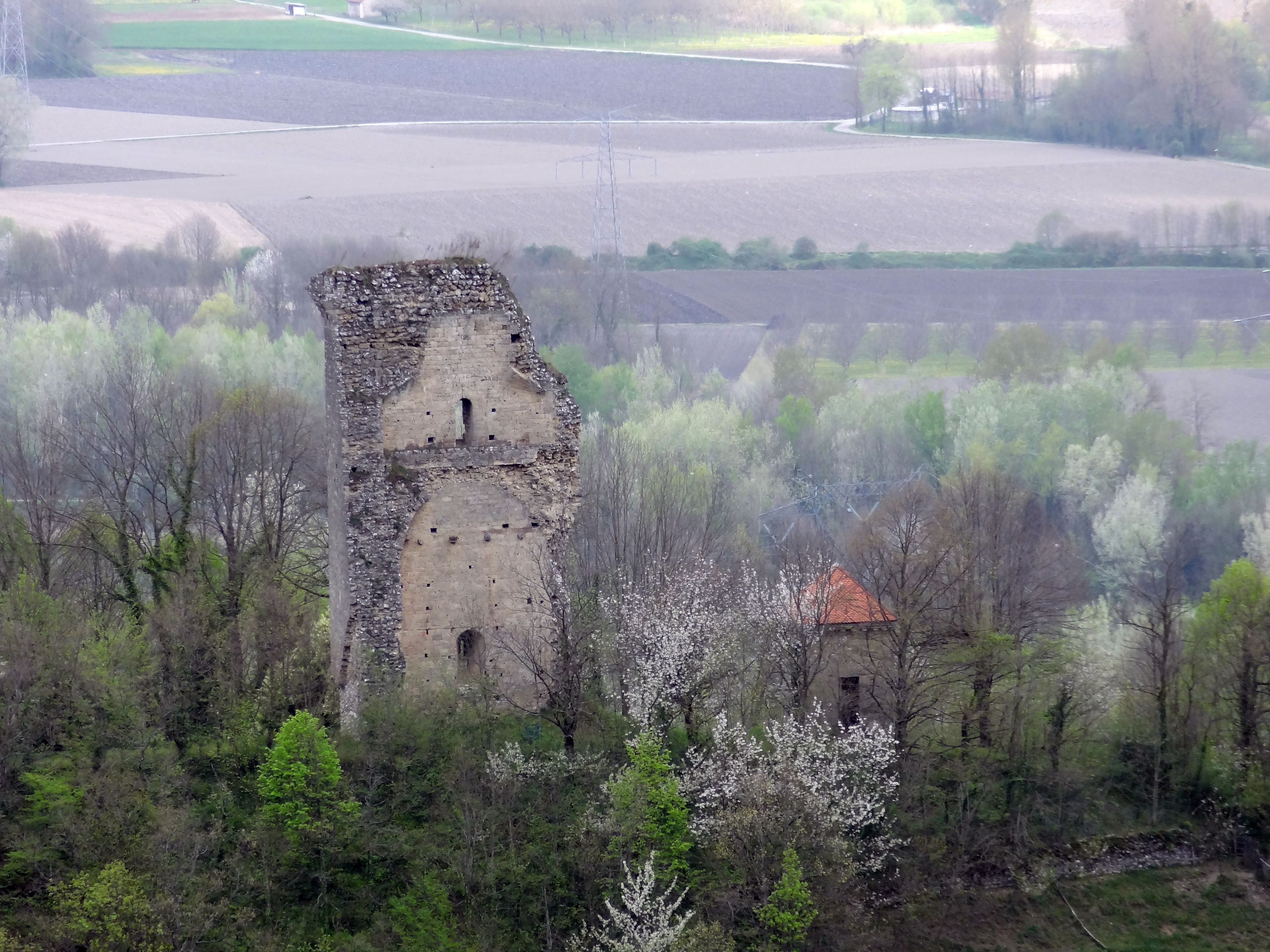 Ruine du château du XIe siècle.